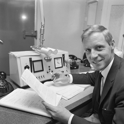 Lex Braamhorst.